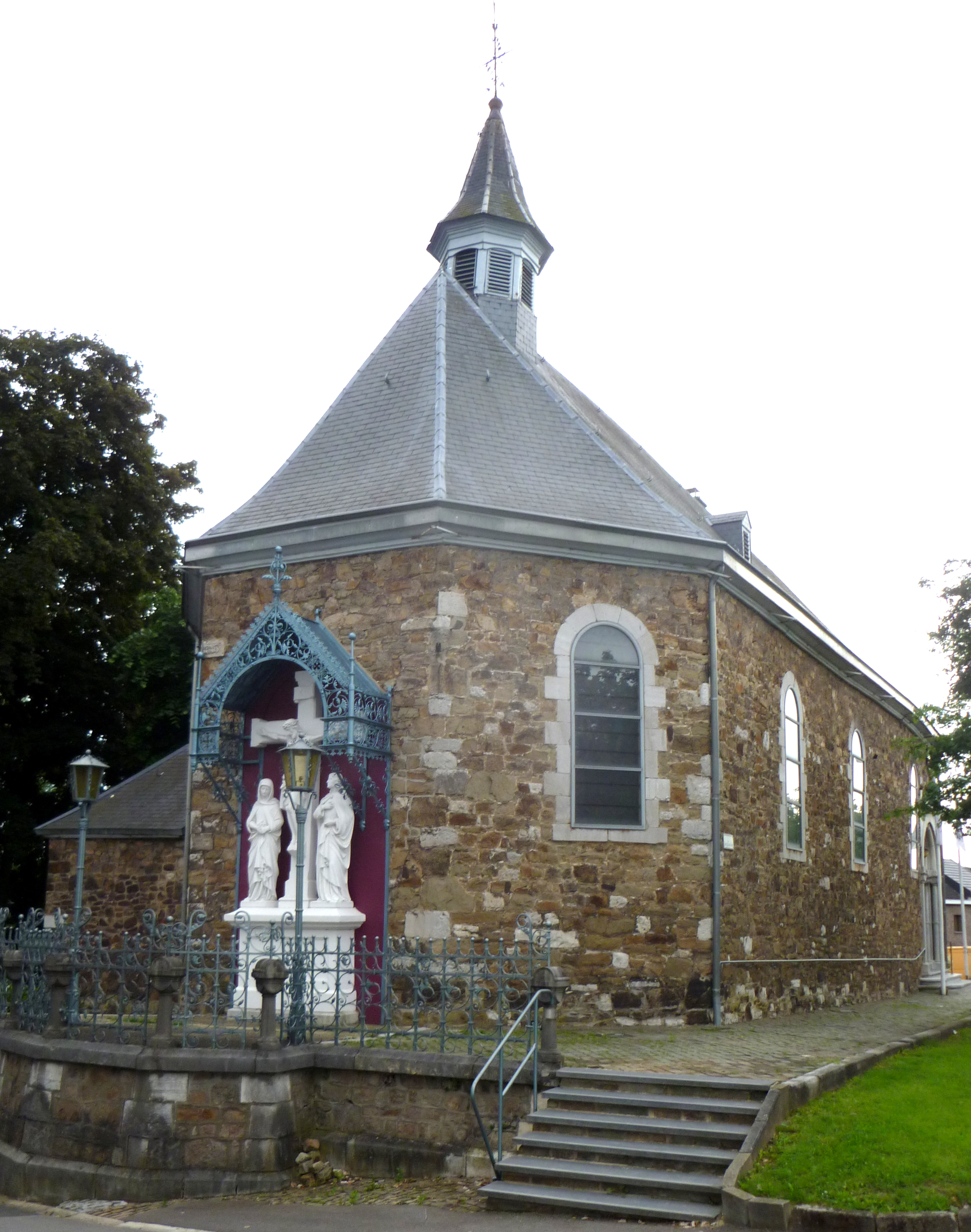 Bergkapelle in Eupen; Baudenkmal in Eupen; Golgatha-Skulptur von Gustav Angelo Venth